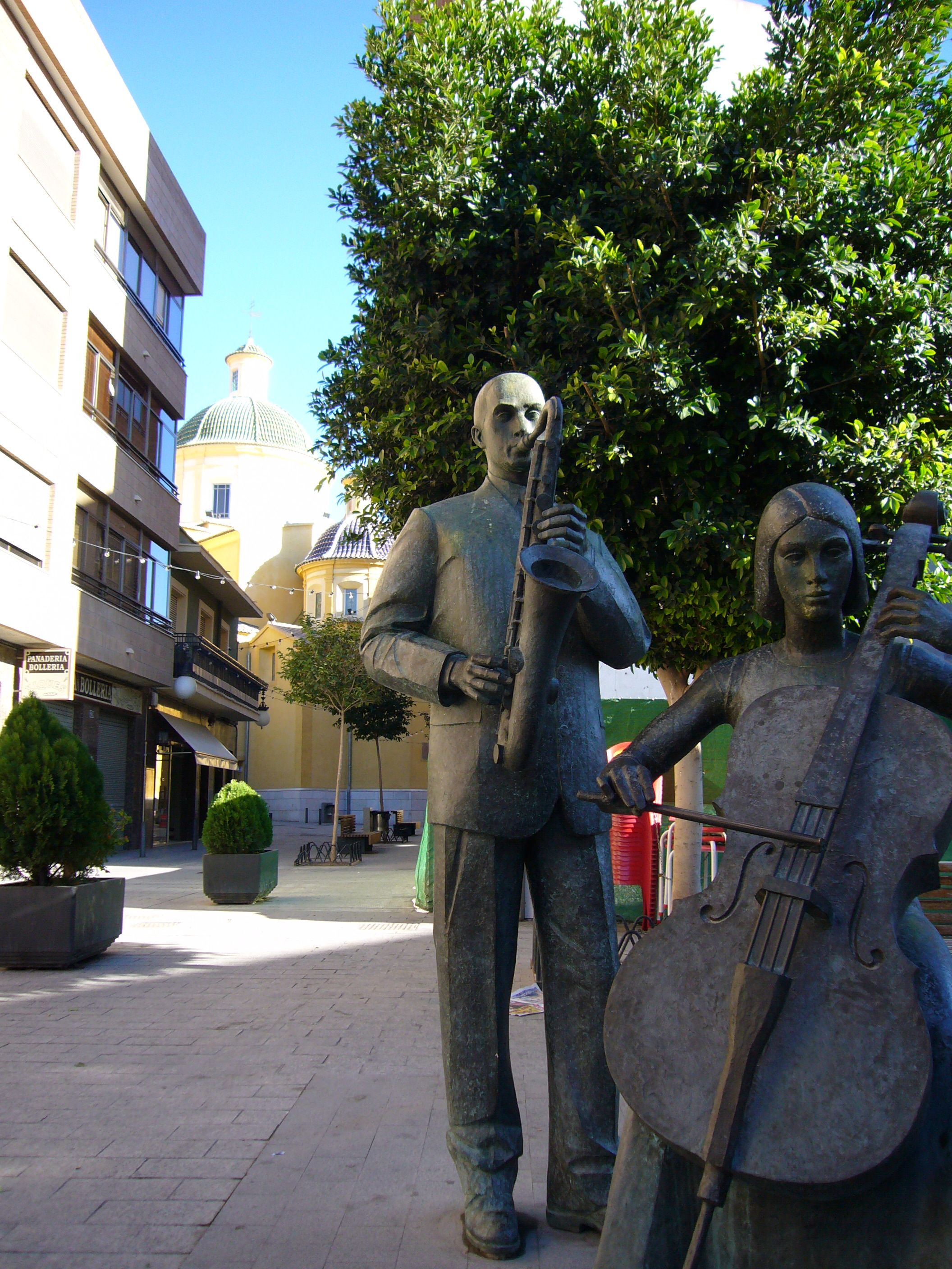 Monumento a la música, sito en la Plaza Ascensión Guijarro Jover